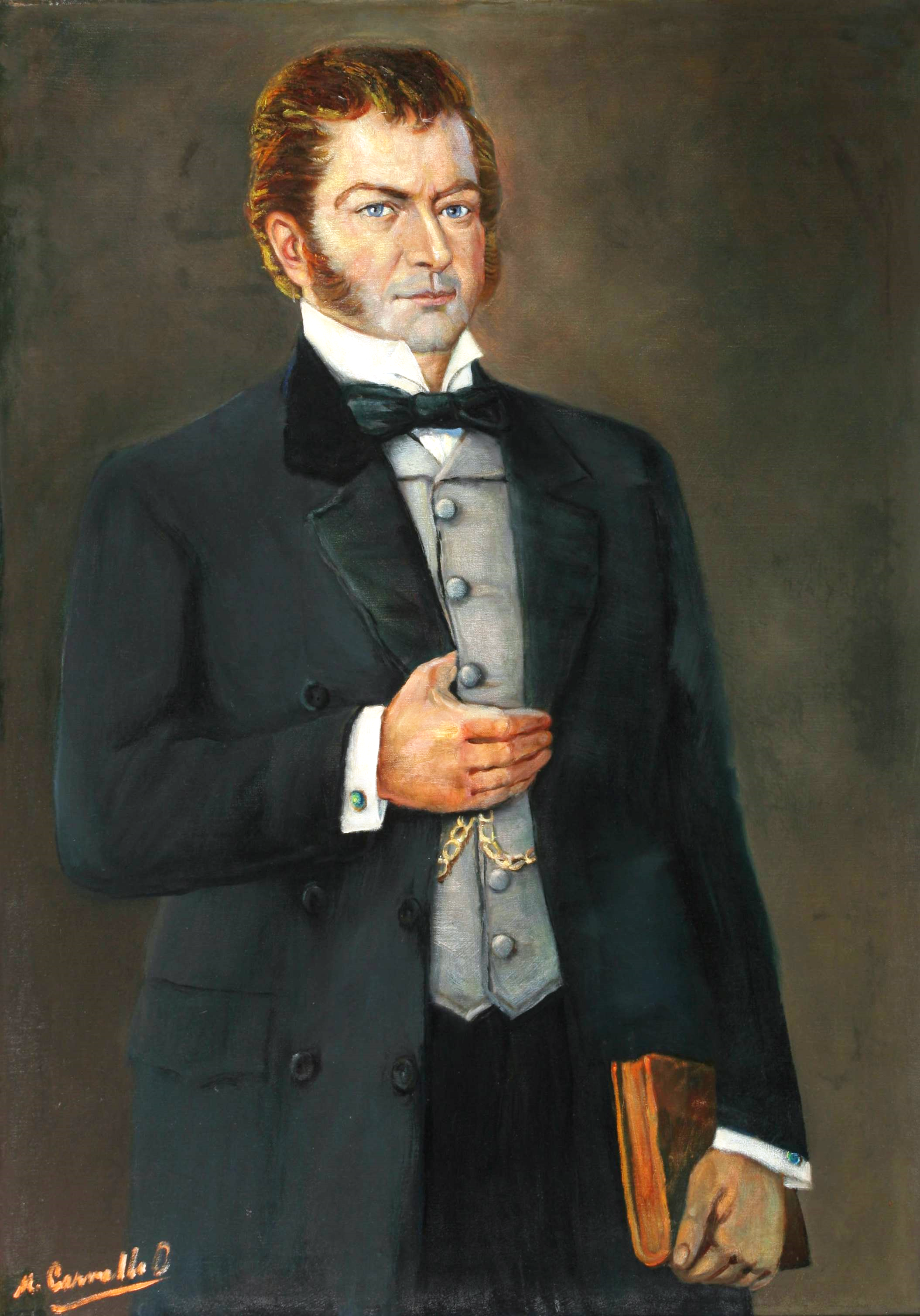 Imagen extraída del libro El Diputado Bernardo O´Higgins en el Congreso del 1811